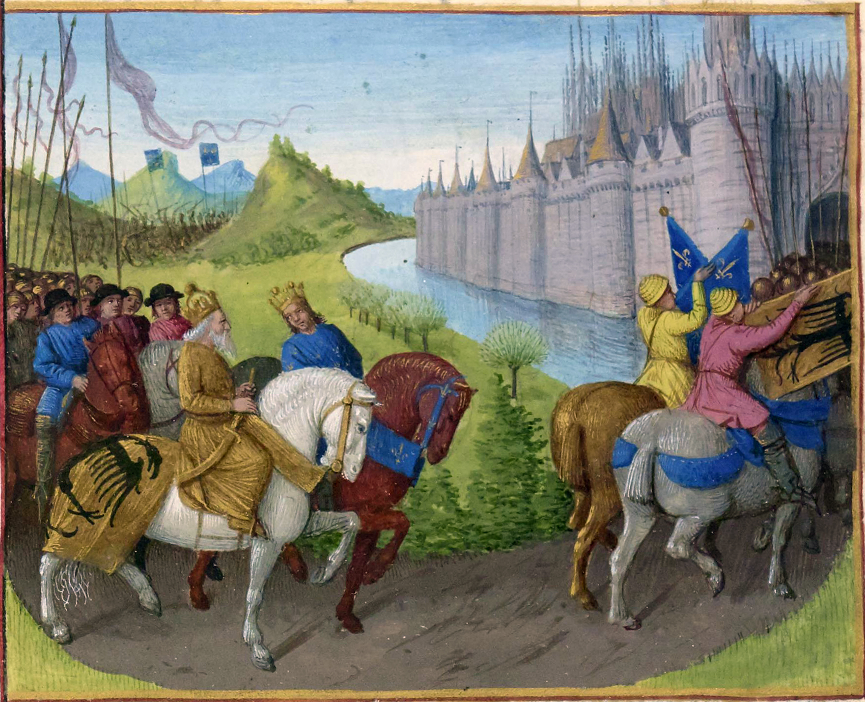 Arrivée des croisés à Constantinople. Bataille entre Français et Turcs en 1147 et 1148 Grandes Chroniques de France, enluminées par Jean Fouquet, Tours, vers 1455-1460 Paris, BnF, département des Manuscrits, Français 6465, fol. 202 (Livre de Louis VII Le Jeune) Arrivée des croisés à Constantinople : Louis VII le Jeune et Conrad, empereur d'Allemagne, entrent dans la ville, suivis d'un important cortège de seigneurs et de chevaliers. Bataille entre Français et Turcs en 1147 et 1148 (en arrière-plan à gauche) : Pendant la seconde croisade en 1147 et 1148, les Turcs combattent les hommes de Louis VII le Jeune. Cette bataille se réfère peut-être à la défaite française de novembre 1147.